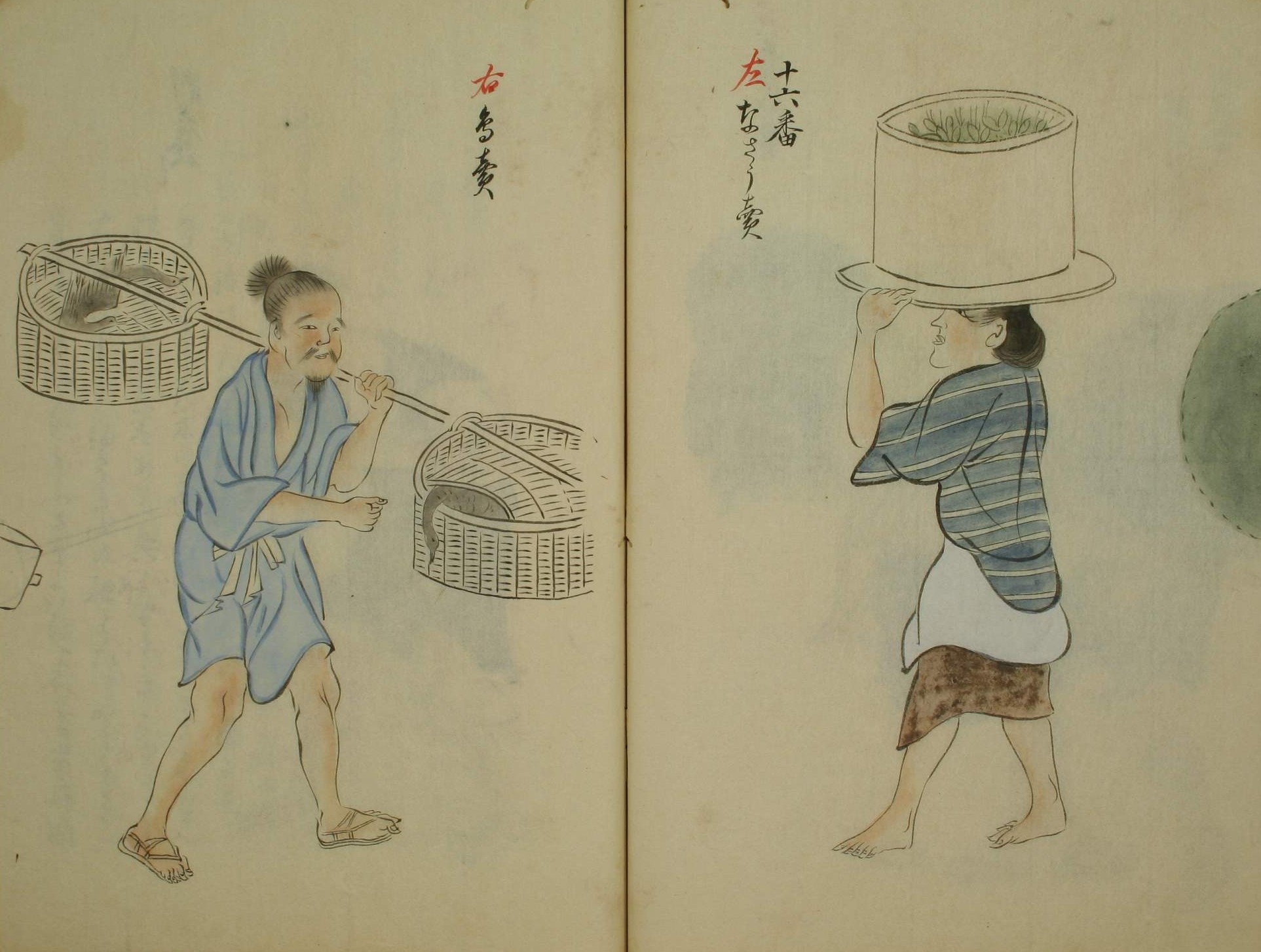 三十二番職人歌合』、垂恵 (?)、1494年、その1838年模写